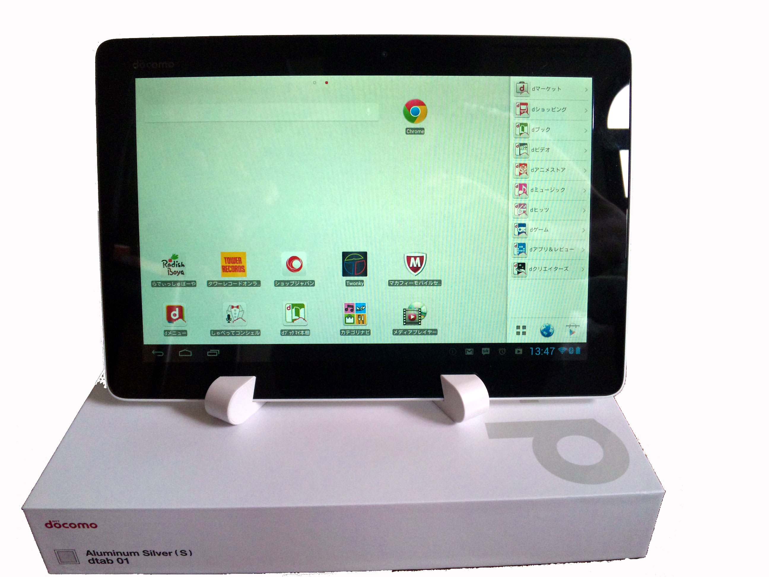 NTTドコモ タブレット dtab01